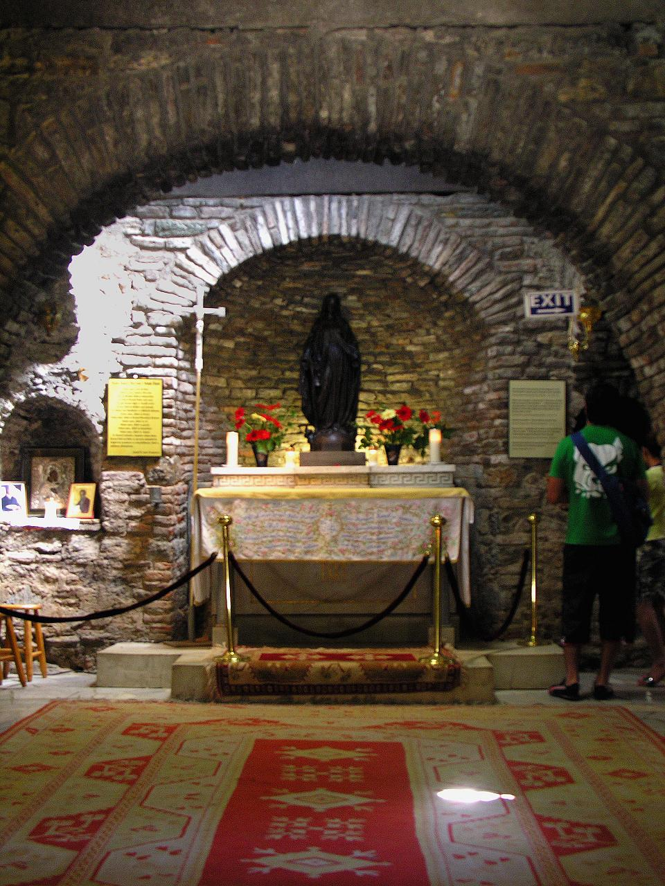 Turkey-2843